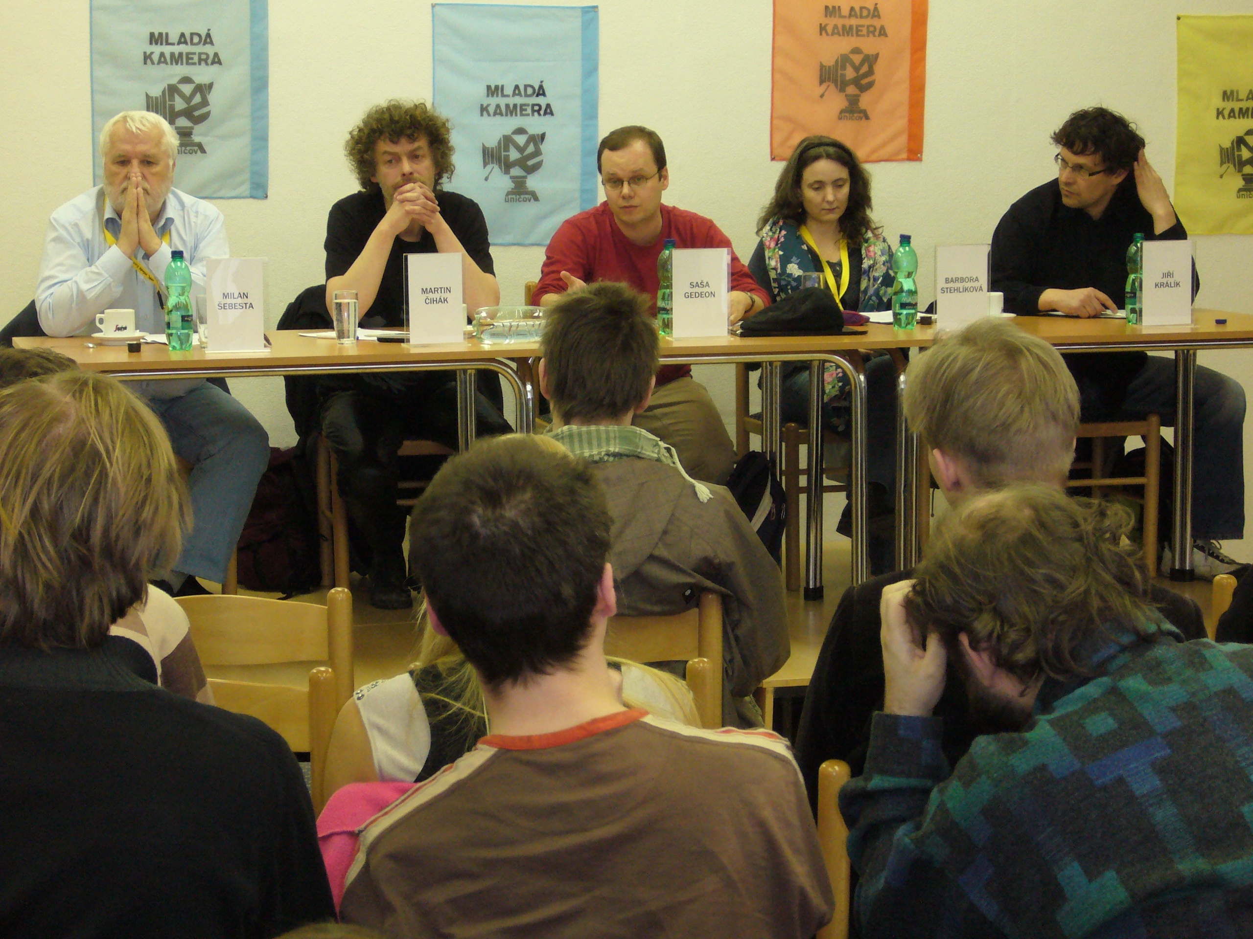 Mladá kamera Uničov 2011 - závěrečný rozborový seminář, porota (zleva): Milan Šebesta, Martin Čihák, Saša Gedeon, Barbora Stehlíková, Jiří Králík